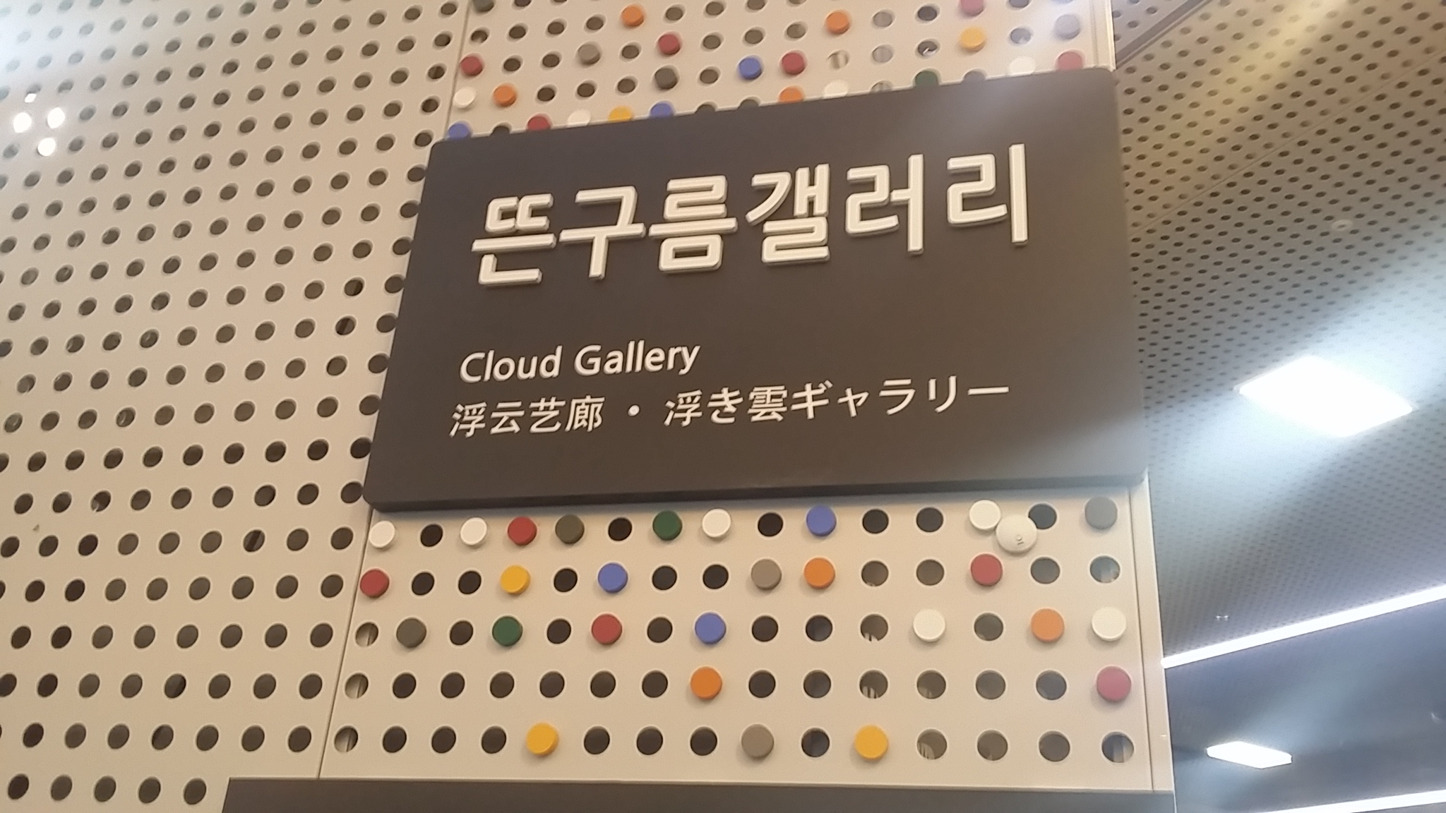 조선말: 서울 시민청 뜬구름갤러리